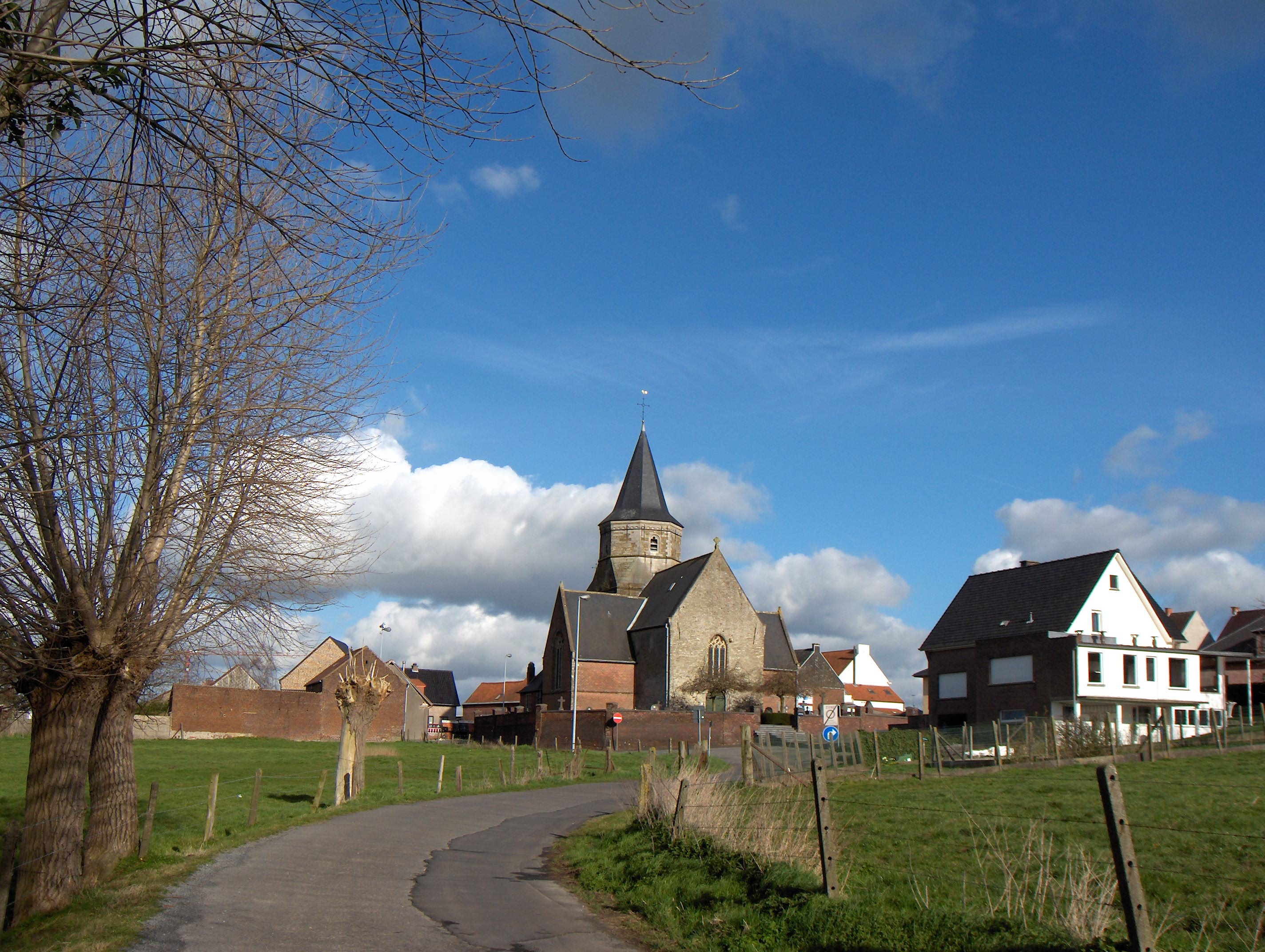 Godveerdegem (Ortsteil der Gemeinde Zottegem, Belgien, Prov. Ostflandern), Sint-Paulus-Bekeringkerk